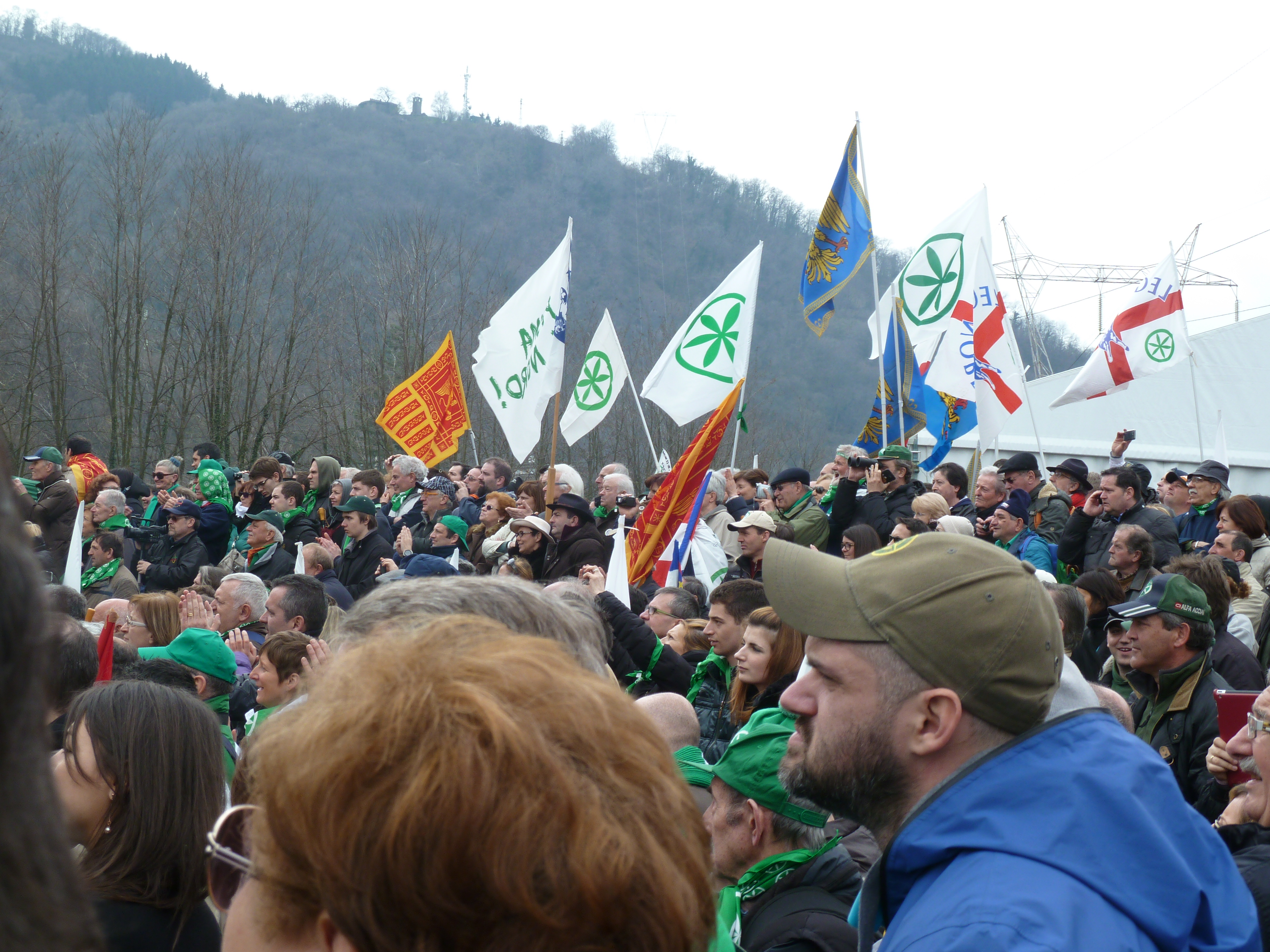 Foto dal raduno della Lega Nord a Pontida ad aprile 2013.